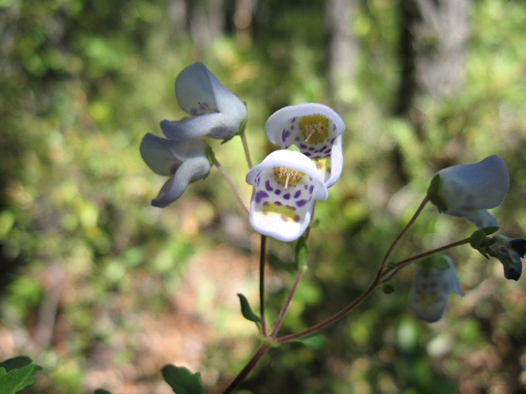 R.N. los Ruiles Región del Maule